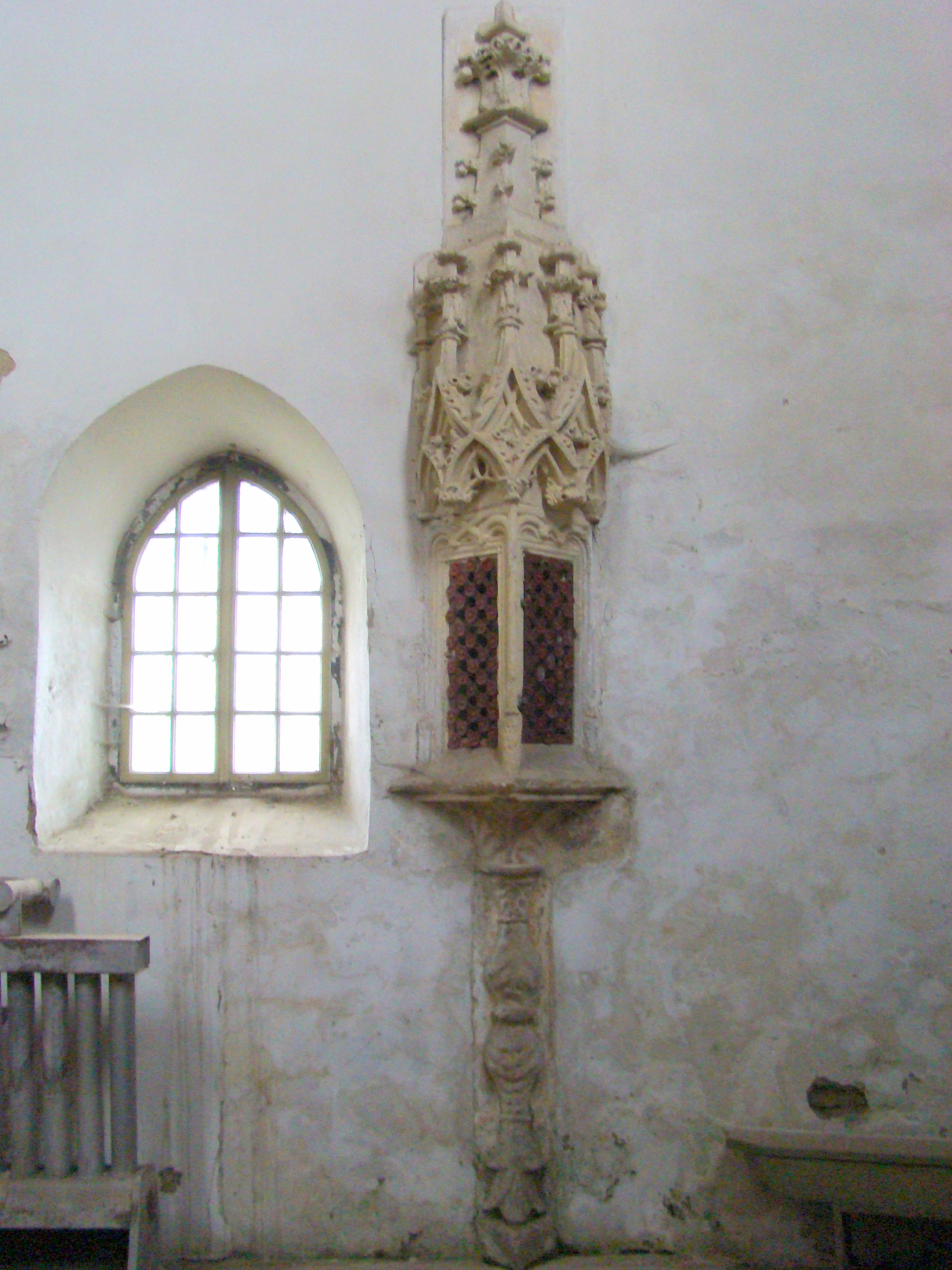 Biserica evanghelică fortificată, sat TÂRNAVA; comuna TÂRNAVA, județul Sibiu 01